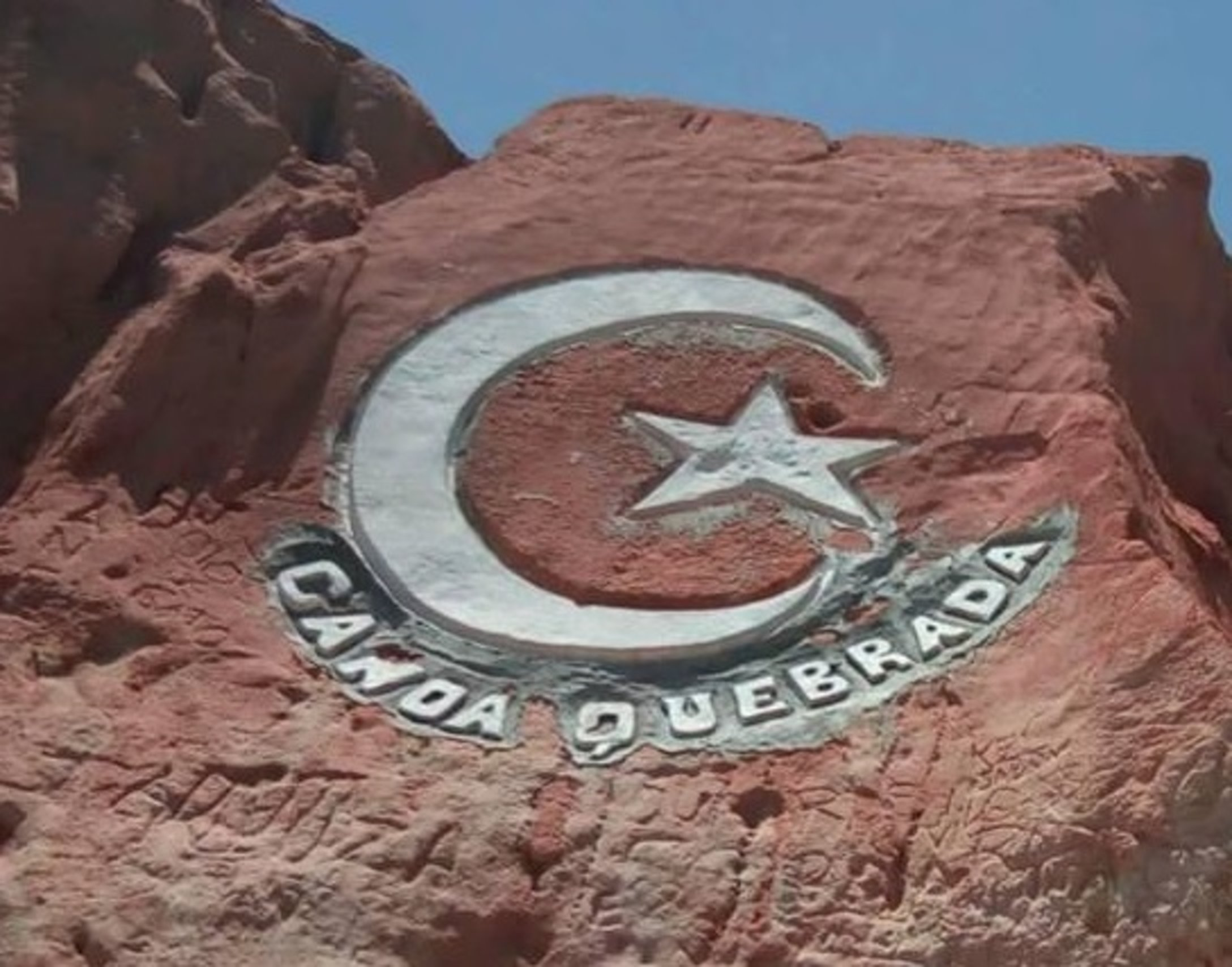 Falésia em Canoa Quebrada, Ceará, Brasil